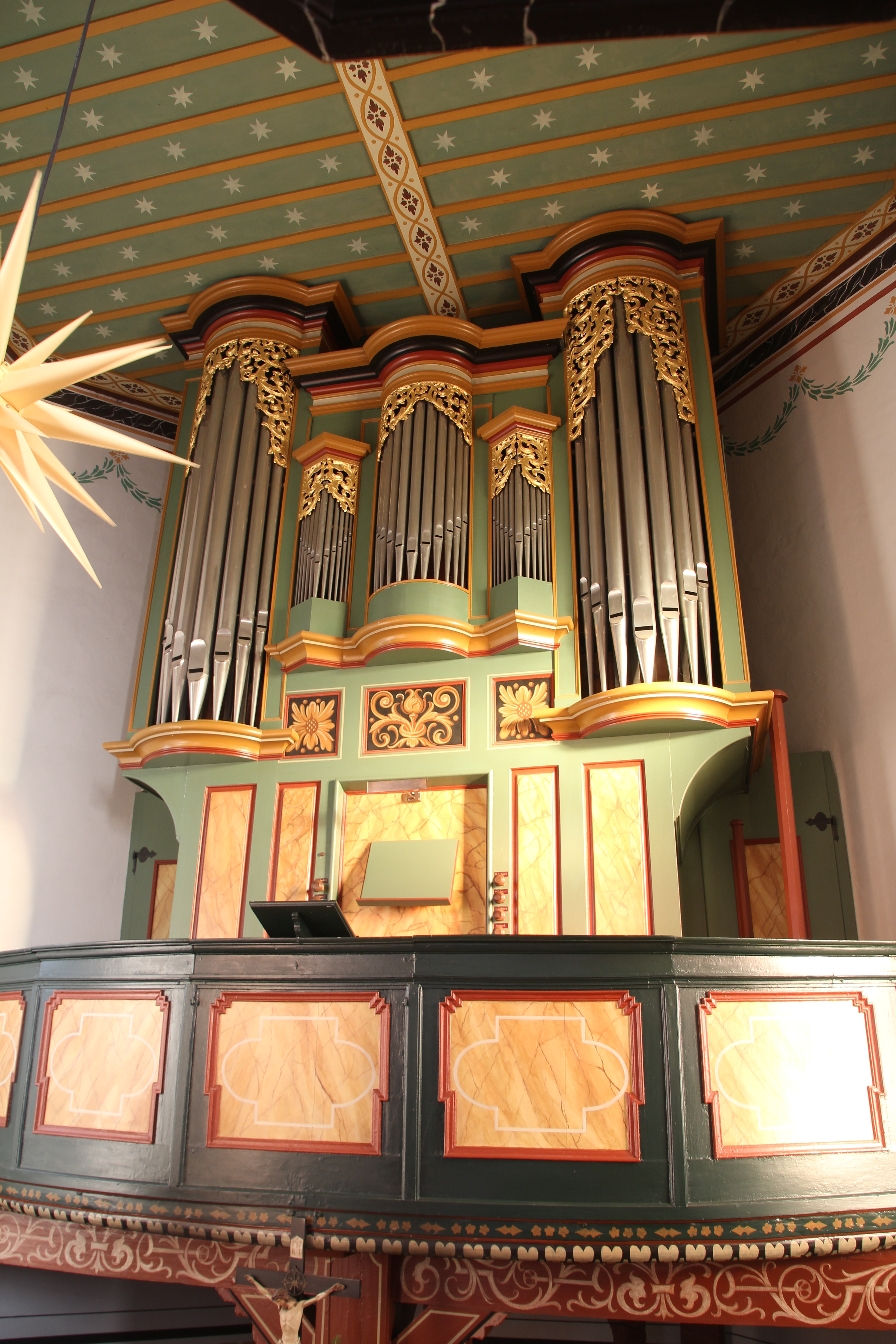 Siehe Bild und Dateiname